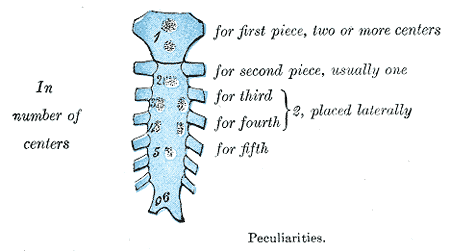 Peculiarities.